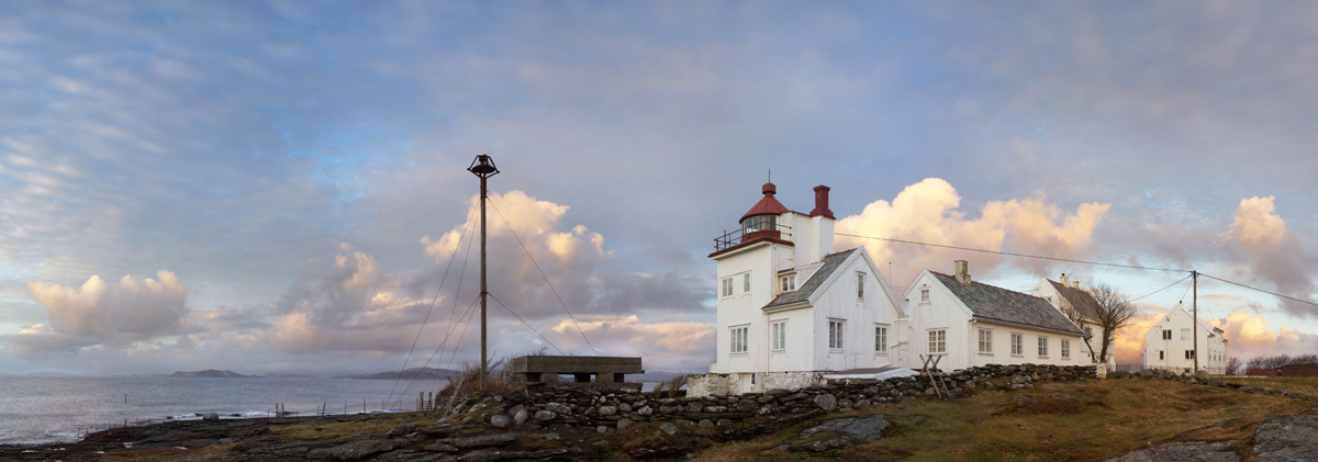 Tungenes fyr ble opprettet i 1828 av Stavanger Havnekommisjon med bidrag fra byens skipsredere og handelsstand. Fyret ble overtatt av Fyrvesenet i 1860, etter vedtak i Stortinget. Tungenes fyr var fra 1862 en familiestasjon, de senere år med tre familier bostatt på området. I 1984 ble stasjonen avfolket og nedlagt.